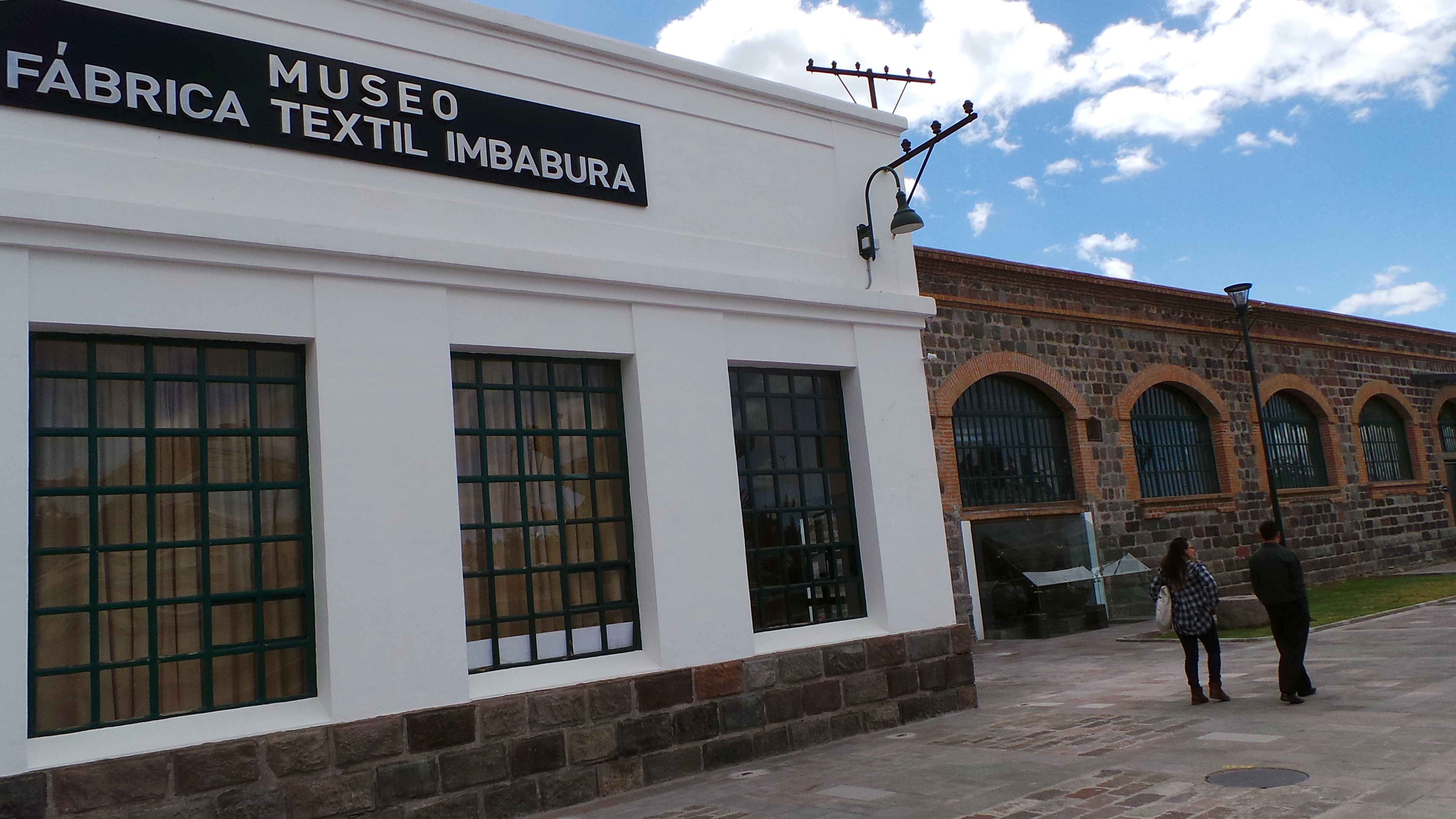 Recorrido ministra SM por provincia de Imbabura 29-07-2014 (14)